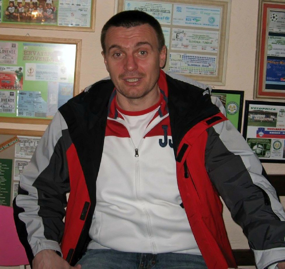 Nekdanji kapetan SLO rokometne reprezentance Uroš Šerbec.